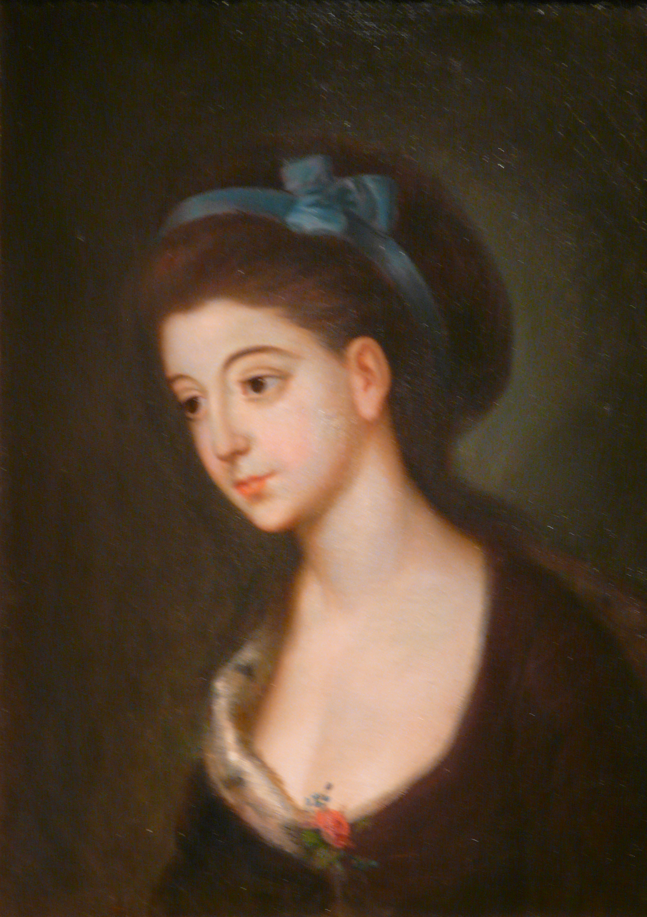 Portret Teresy Czartoryskiej. Polska, XIX w., olej na półtnie